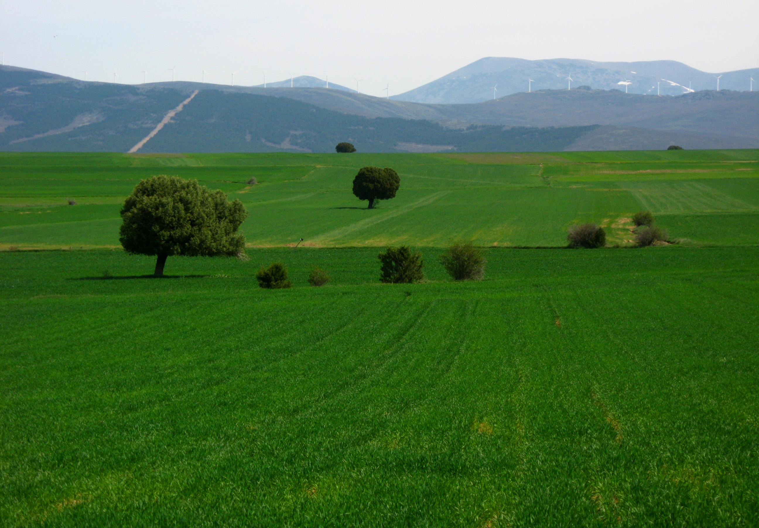 Sabinares de Ciria-Borobia This is a photography of a Site of Community Importance in Spain with the ID: ES4170056. Natura2000 entry, EEA entry